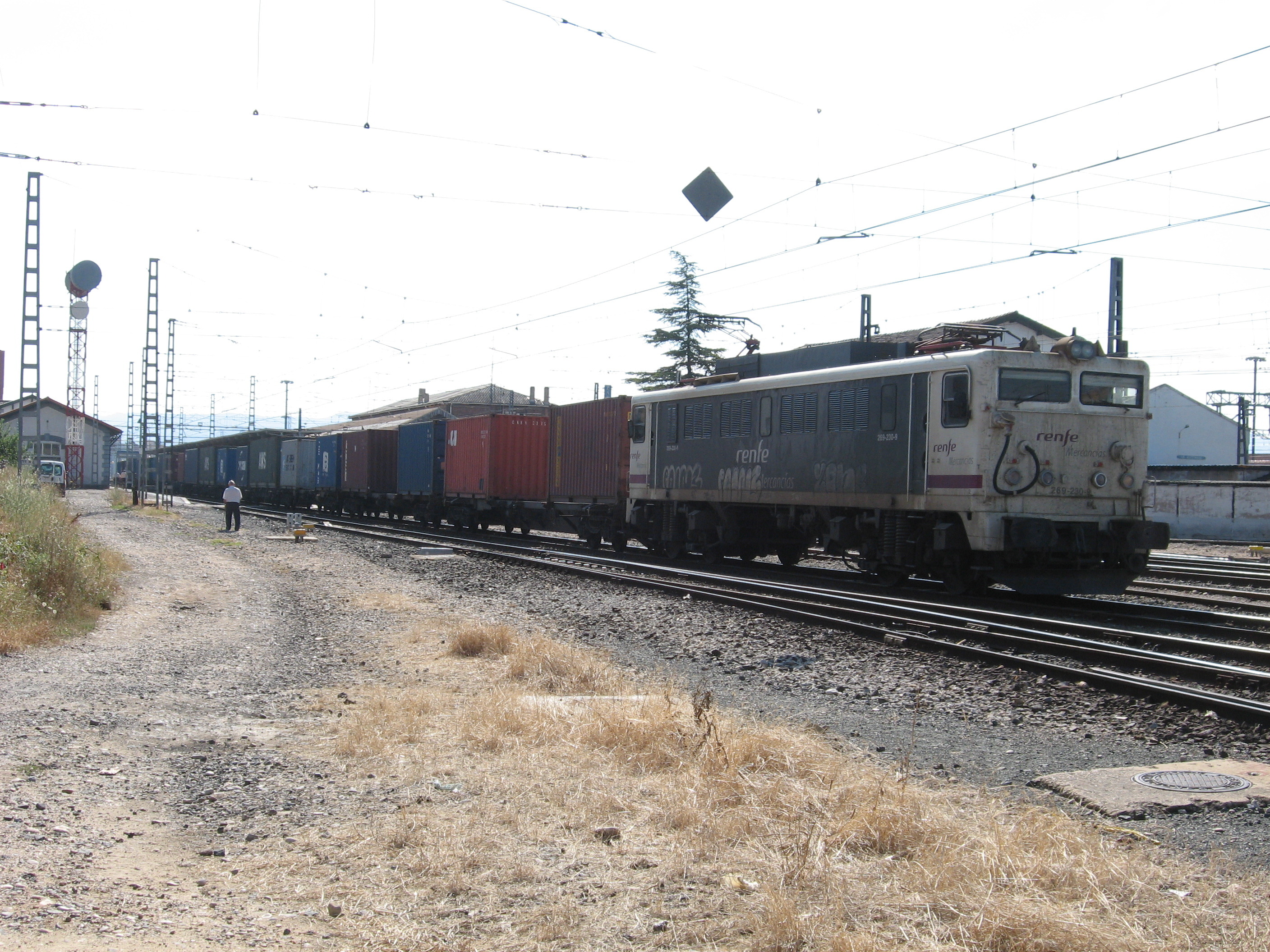 Desc: Tren de mercancías estacionado en la estación del ferrocarril de Miranda de Ebro